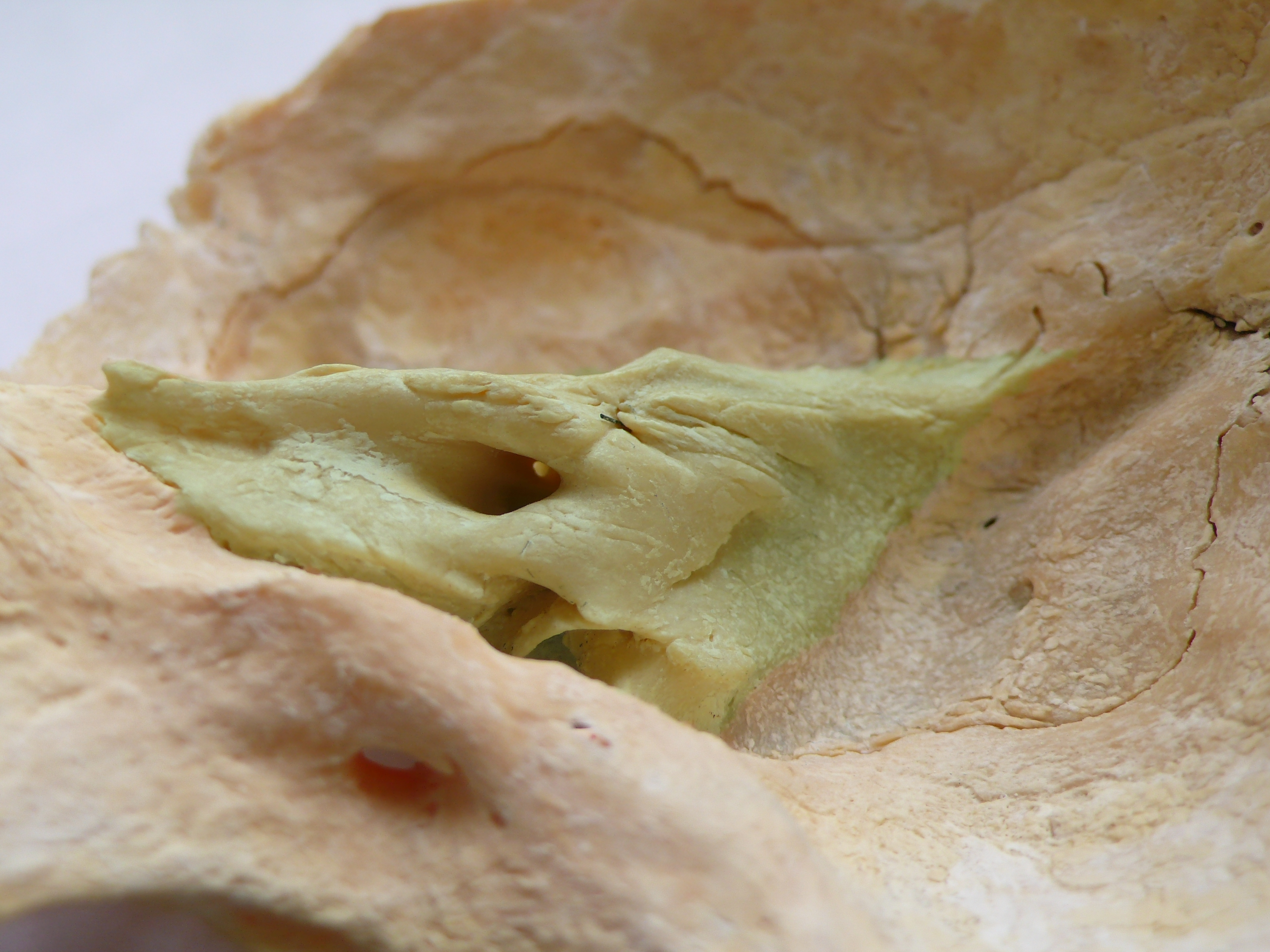 Felsenbeinpyramide (grün), Pyramid of temporal bone (green), (pars mastoidea des os petrosum nicht eingefärbt)